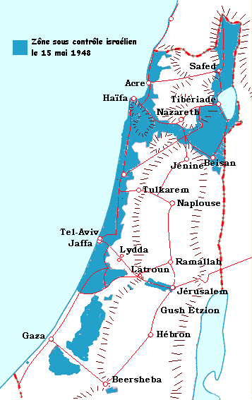 Zône sous contrôle israélien le 20 mai 1948